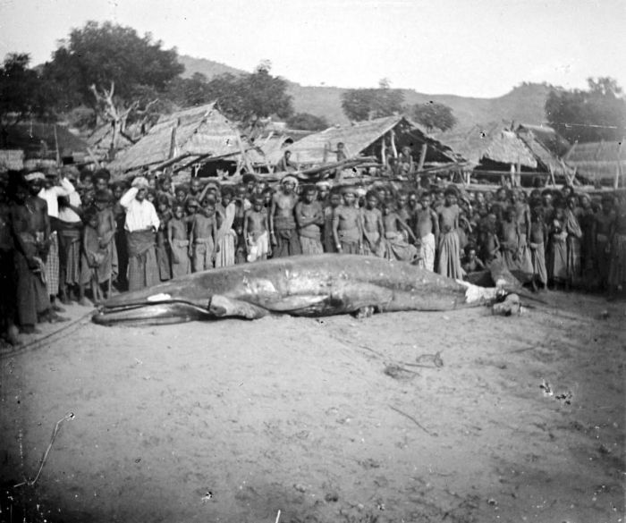 Repronegatief. Bewoners van kampong Lamakera bekijken een gevangen walvis, Noordoost-Solor